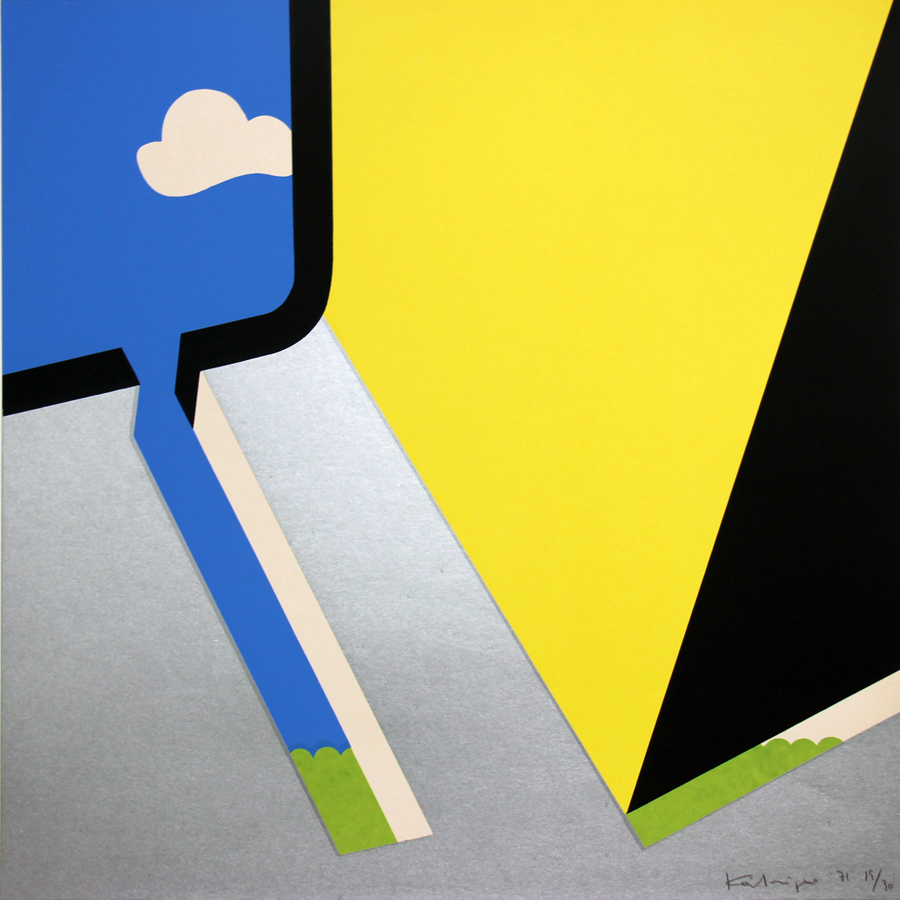 Siebdruck des Künstlers Wilfried Körtzinger: ohne Titel, 1971